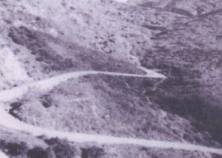 1930년대의 속리산 말티고개